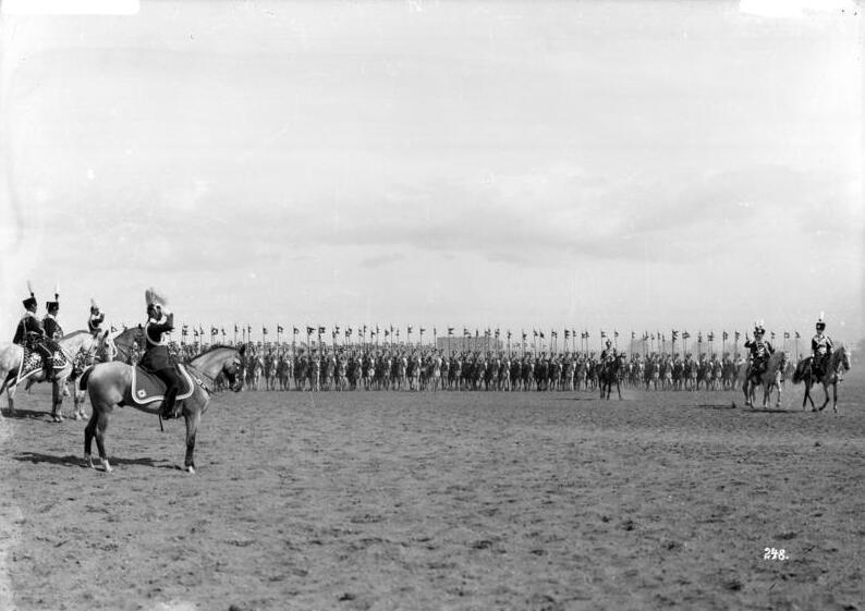 Der Kronprinz an der Spitze seines neuen Regiments nach der Ernennung zum Kommandeur der 1. Leib-Husaren in Danzig-Langfuhr am 15.9.1911. Links der Kaiser und daneben der General der Kavallerie von Mackensen (Kommandeur des XVII. A.K. Danzig)